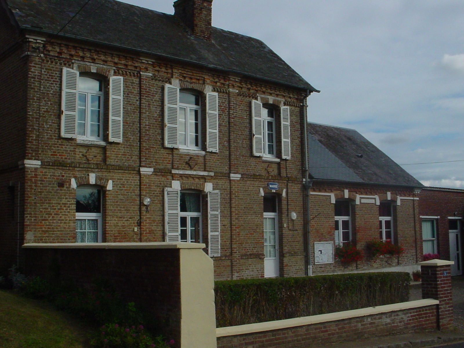 Fresnes-Tilloloy (Somme, France). La mairie se trouve à droite de l'église.